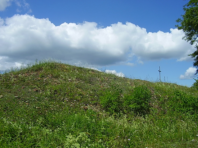 Гайна. Месца касцёла